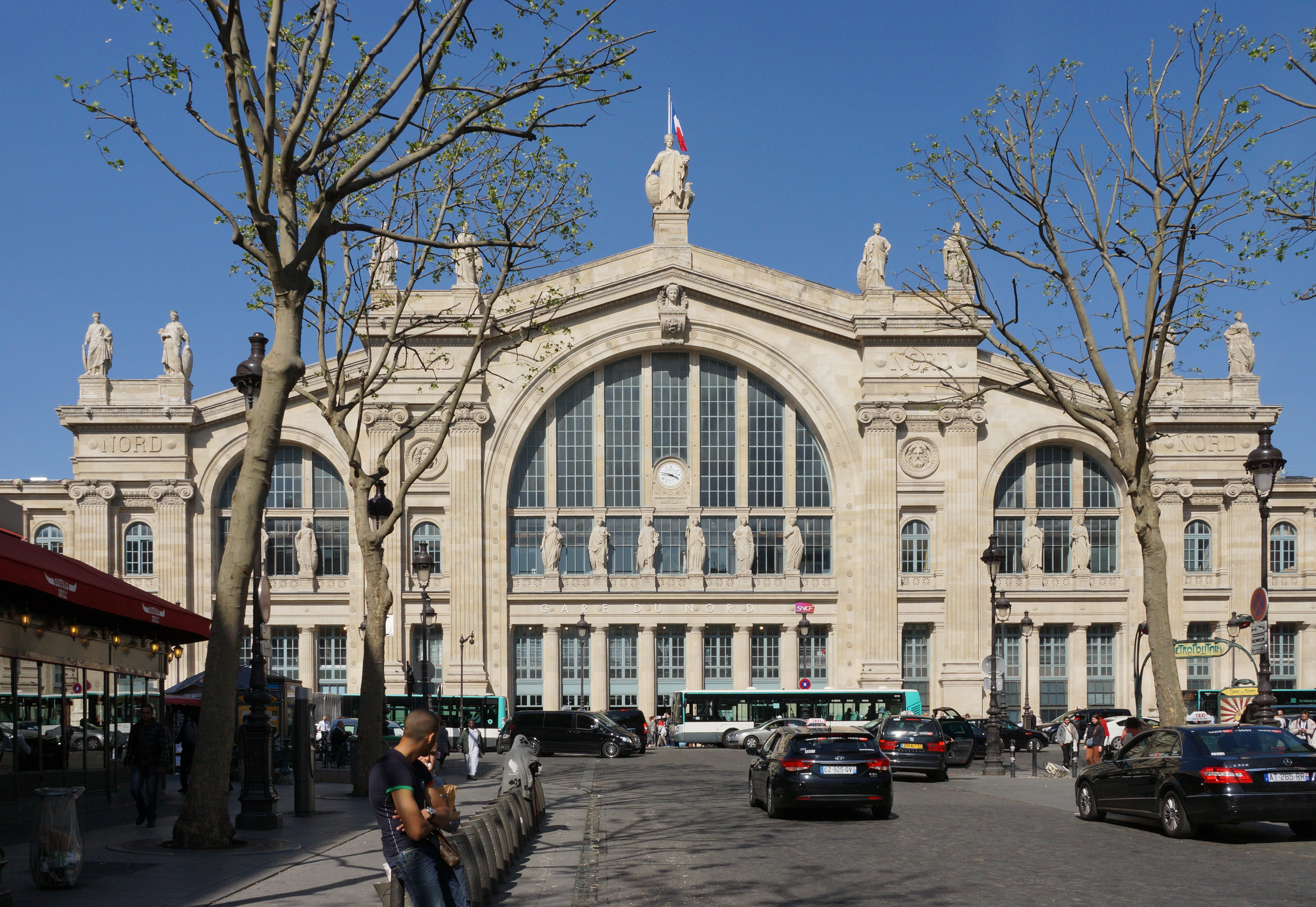 Gare du Nord, Paris, France.